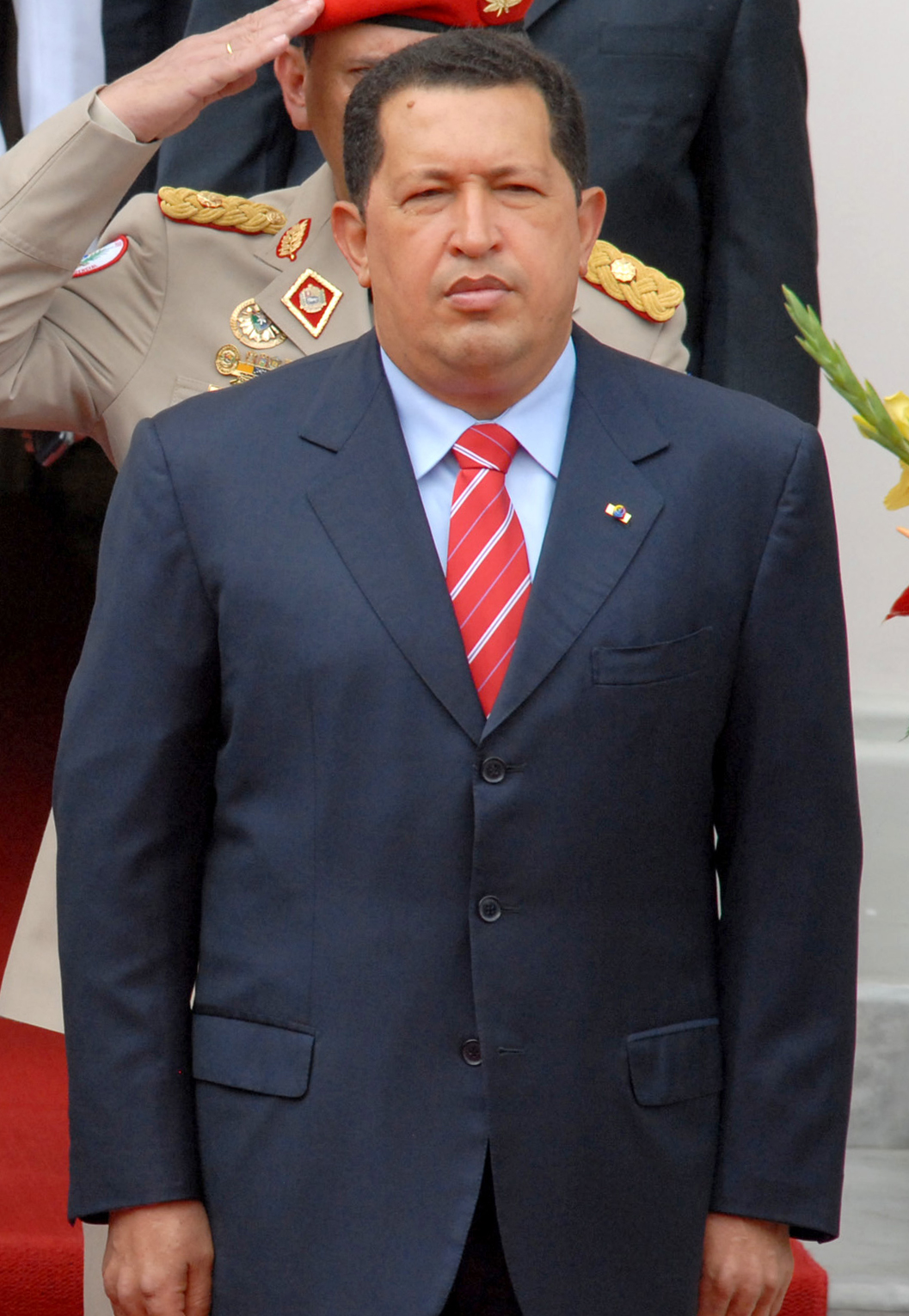 Luiz Inácio Lula da Silva e Hugo Chávez